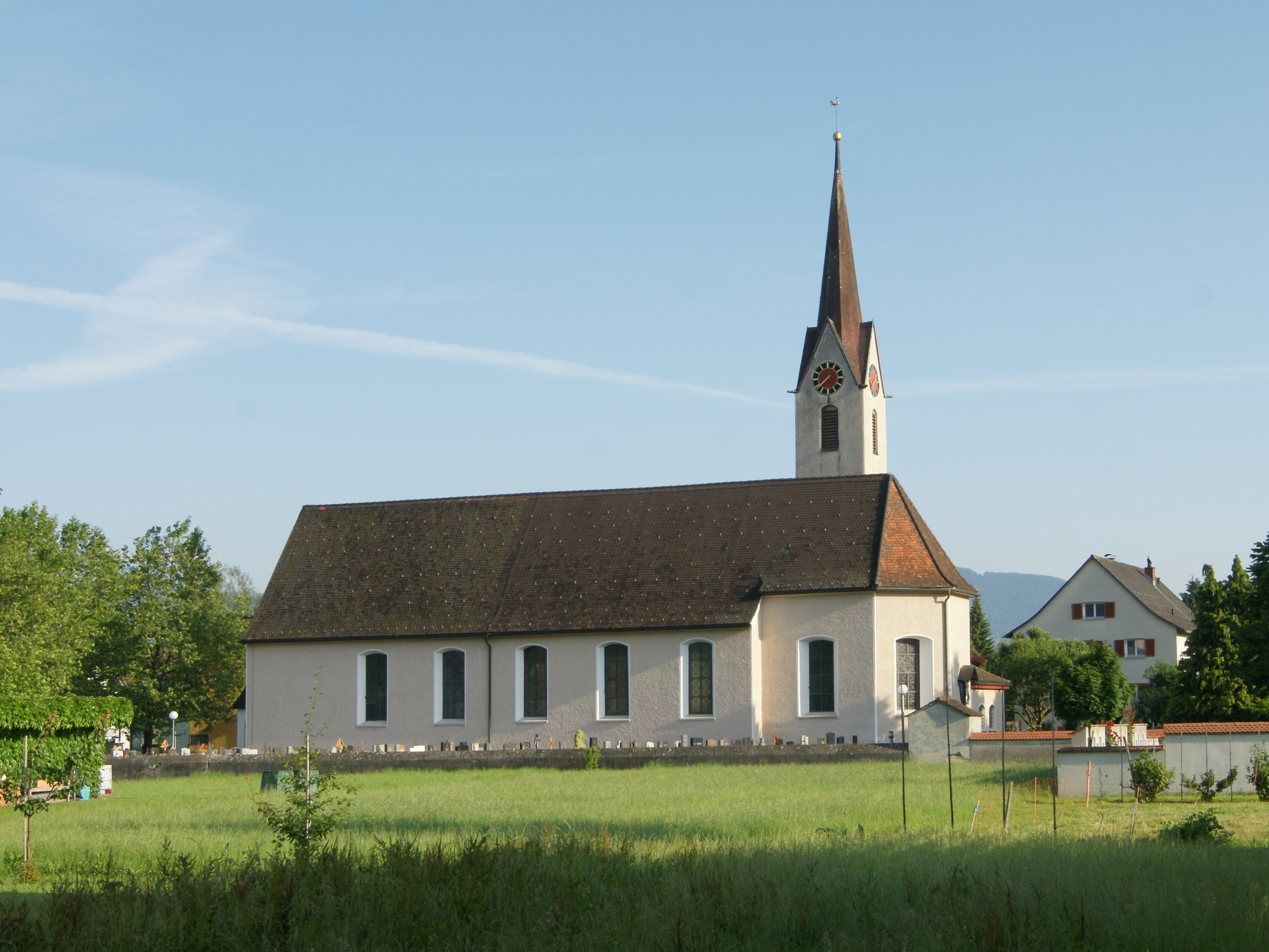 Pfarrkirche "Hl. Batholomäus" in Mäder.